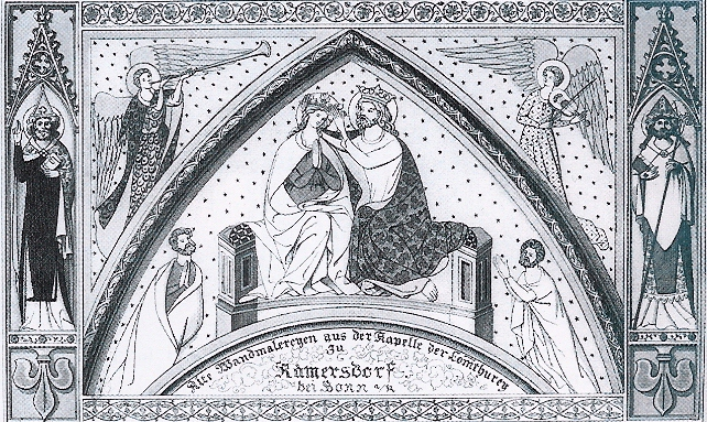 Christian Hohe: Krönung Marias - Reproduktion eines Gewölbegemäldes in der Georgskapelle - Lithografie 1847